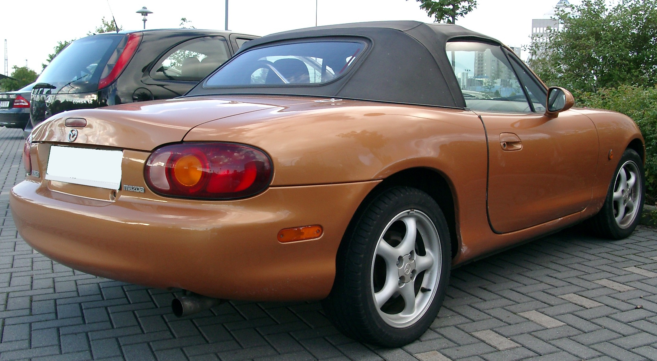 Mazda MX-5